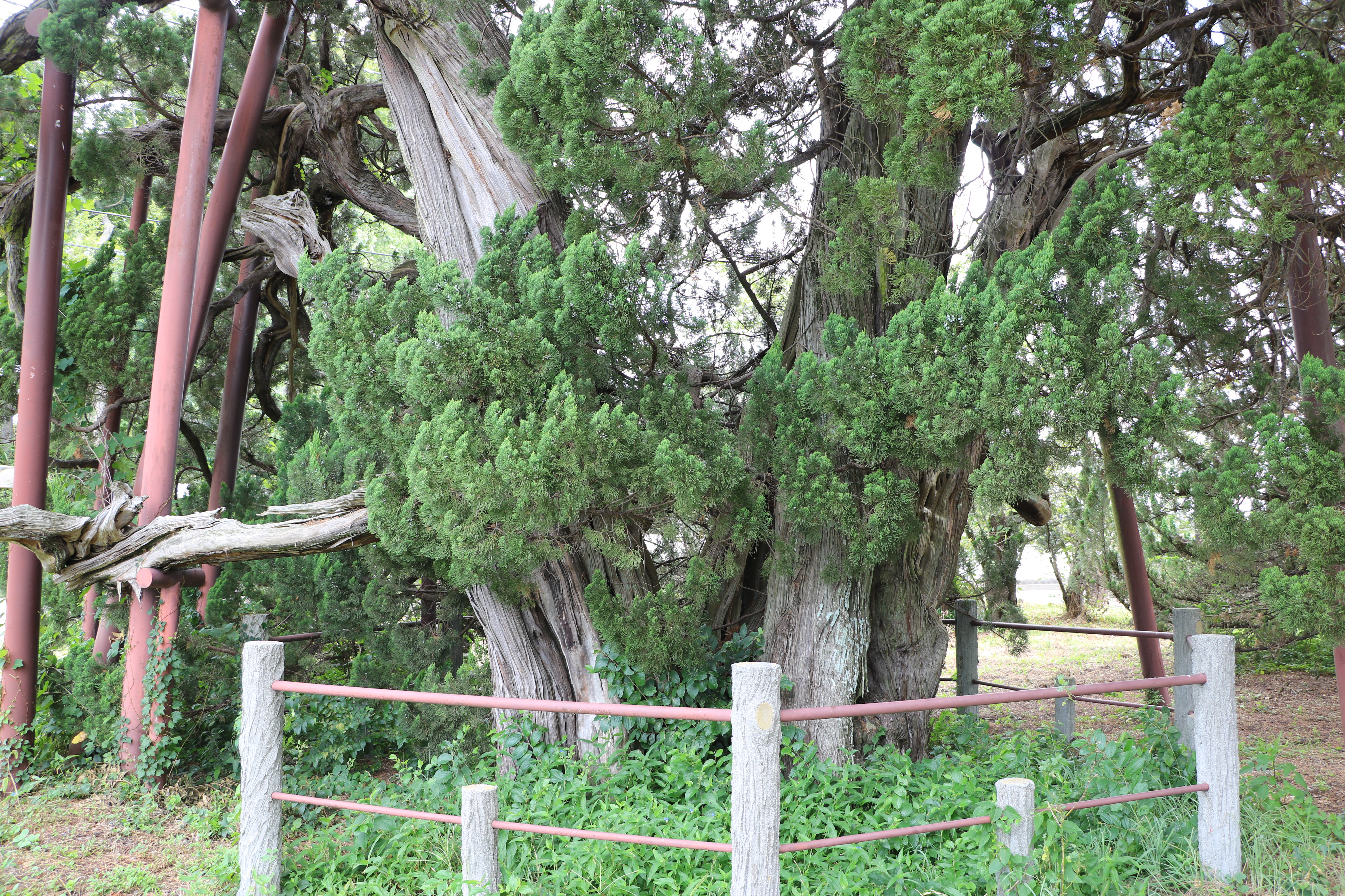 古長禅寺のビャクシンの北西の木（国指定天然記念物、山梨県南アルプス市）